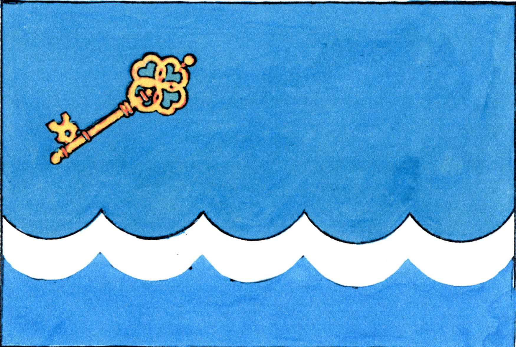 Vlajka města Suchdol nad Lužnicí